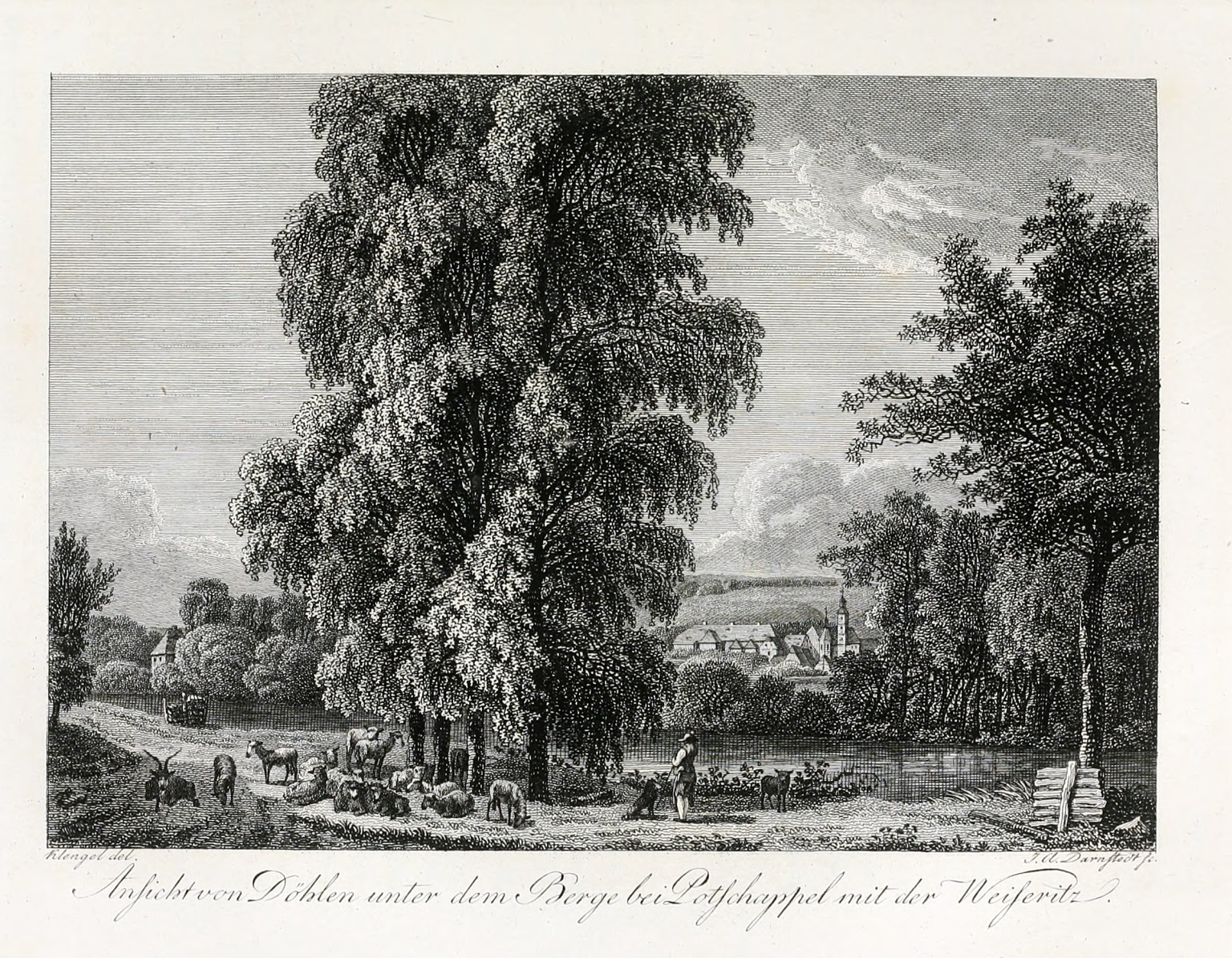 Abbildungen aus " Der Plauische Grund bei Dresden mit Hinsicht auf Naturgeschichte und schöne Gartenkunst" und "Mineralogische Beschreibung des Plauischen Grundes bis Tharand"